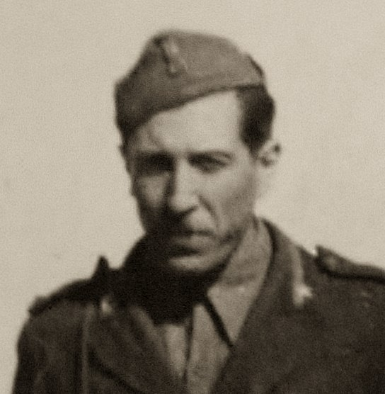 Riccardo Fedel